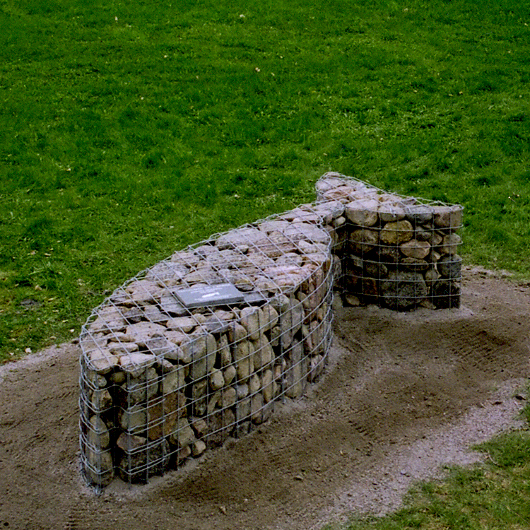 Il s'agit du Tacon-Site de l'Arbre réalisé par le duo d'artistes Interaction Qui (A. Laroche et J. Maltais) en 2005. C'est le deuxième Tacon-Site réalisé dans le cadre du projet Événement-Ouananiche. Il porte le numéro 02 et appartient à la Municipalité de Saint-François-de-Sales (Lac-Saint-Jean, Québec, Canada).